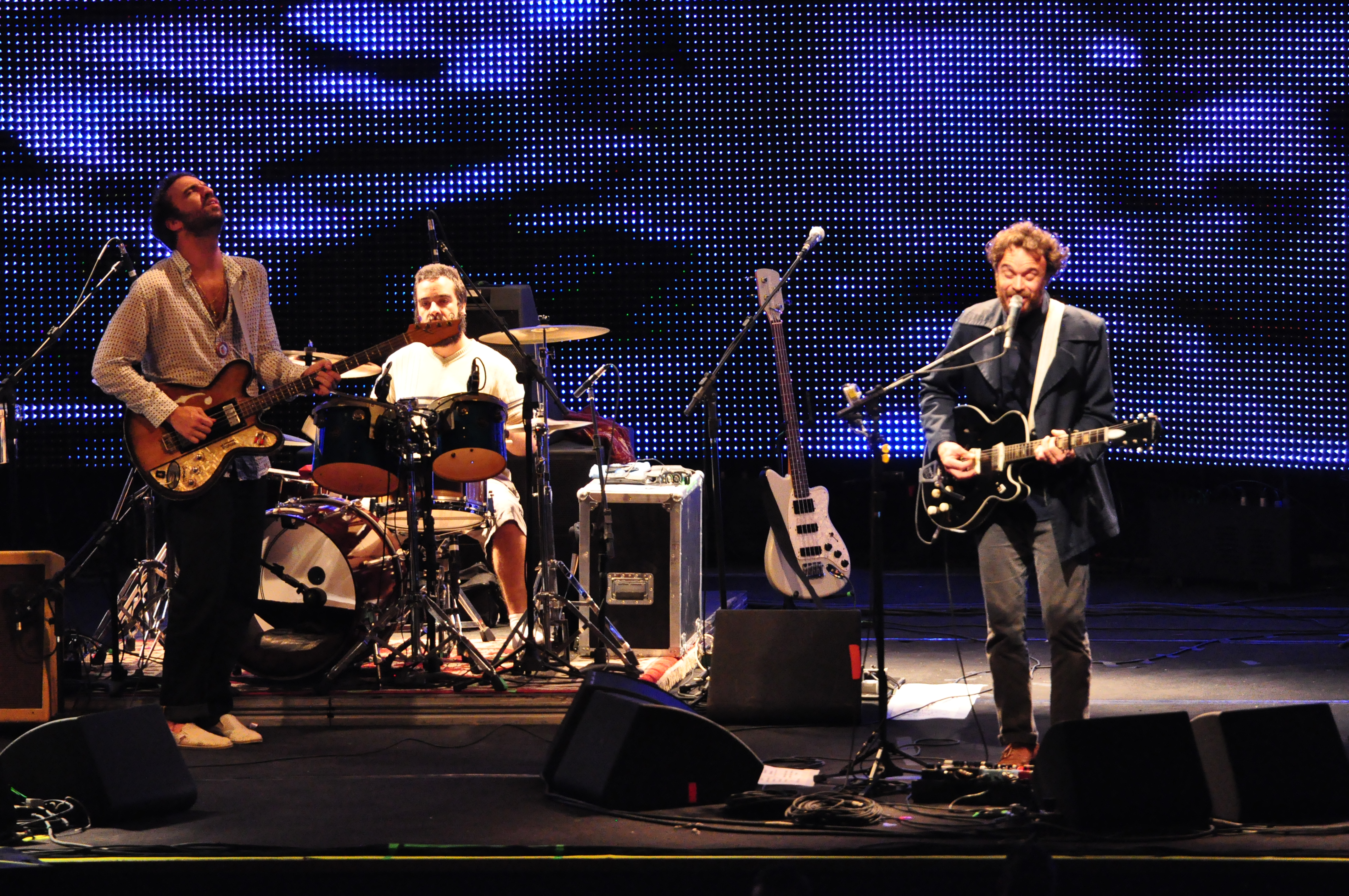 Foto: Priscila Leal